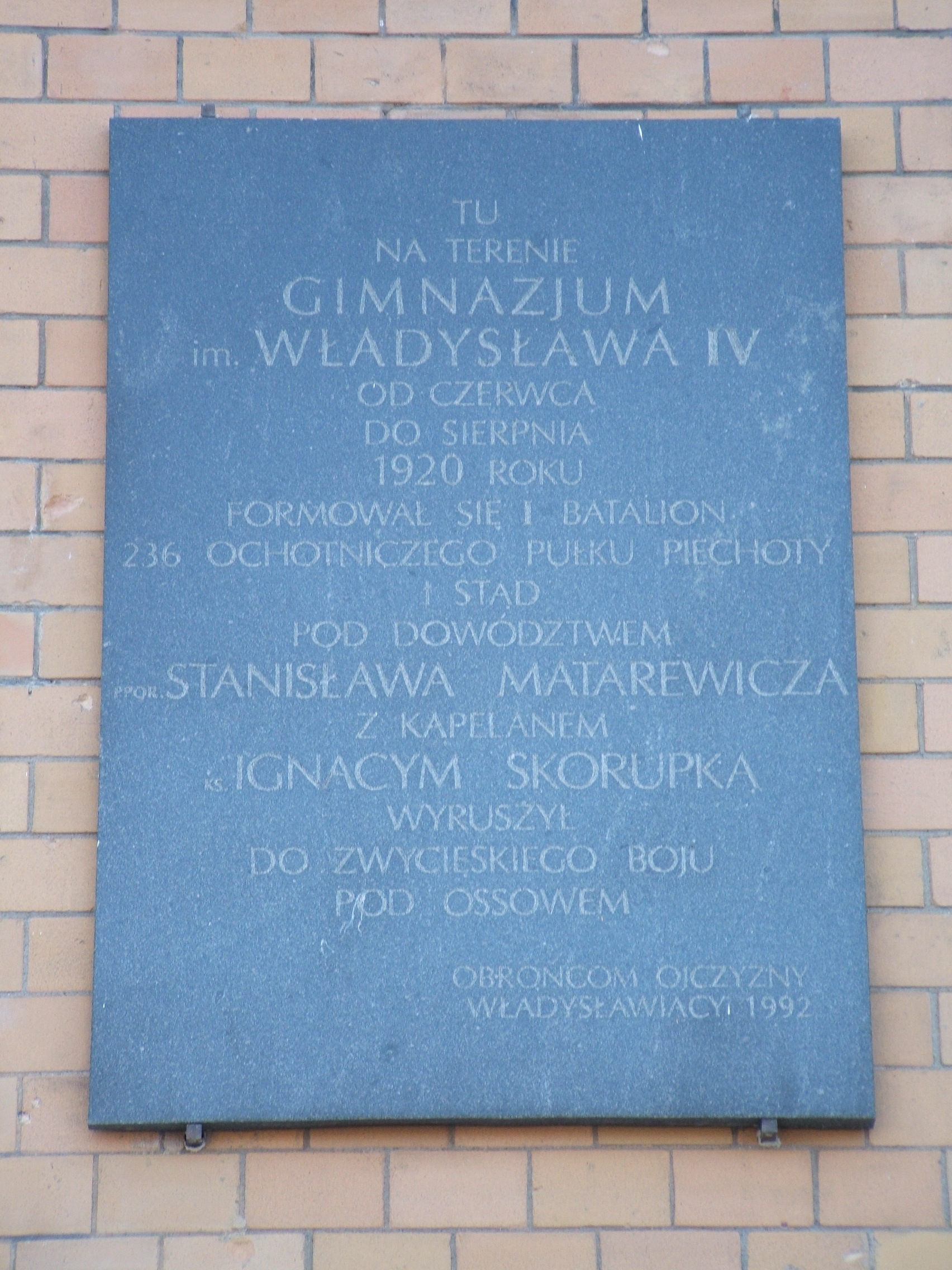 Tablica na budynku VIII LO od strony al. "Solidarności"